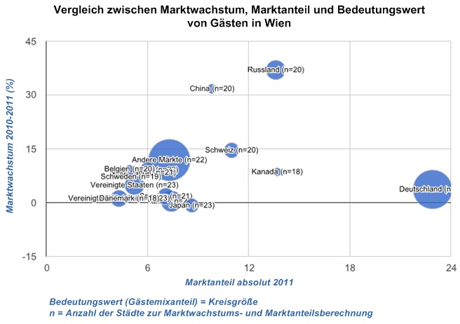 Beispiel einer von TourMIS generierten Grafik